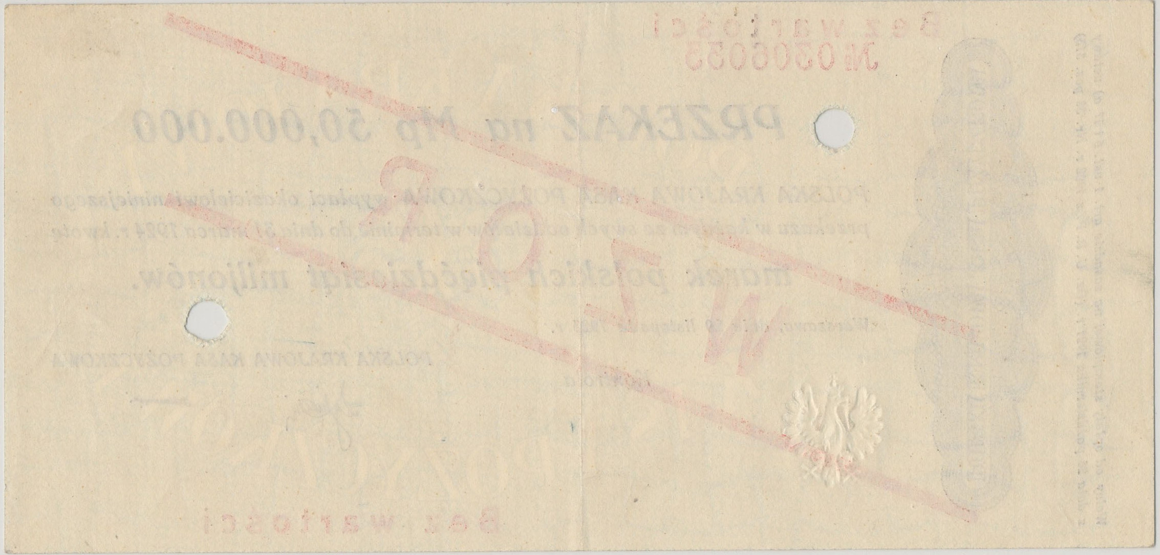 Przekaz 50000000 marek polskich 1924 WZÓR rewers